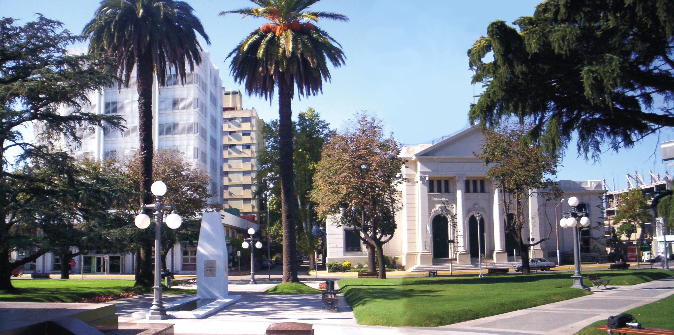 Plaza 25 de Mayo, en Junín, Argentina.